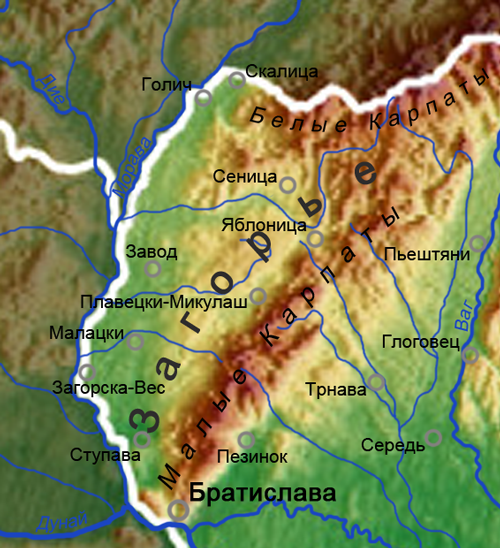 Историческая область Загорье в Западной Словакии